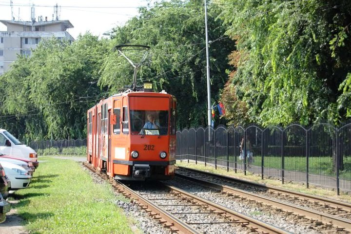 Tramvajus Oradios mieste. Rumunija.